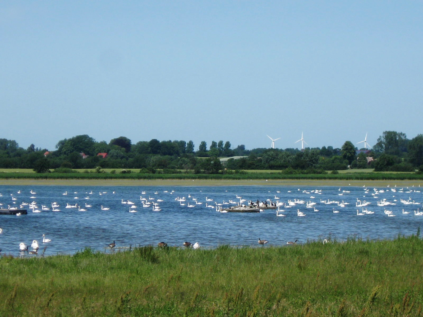 Das auch als EU-Vogelschutzgebiet ausgewiesene Naturschutzgebiet „Schwansener See“ bietet zahlreichen Vogelarten (etwa 100 Brutvogelarten) Lebens- und Nahrungsgrundlage. Zudem ist es Rast- und Überwinterungsgebiet für etwa 5000 Vögel, die hier im Frühjahr und Herbst Rast machen.